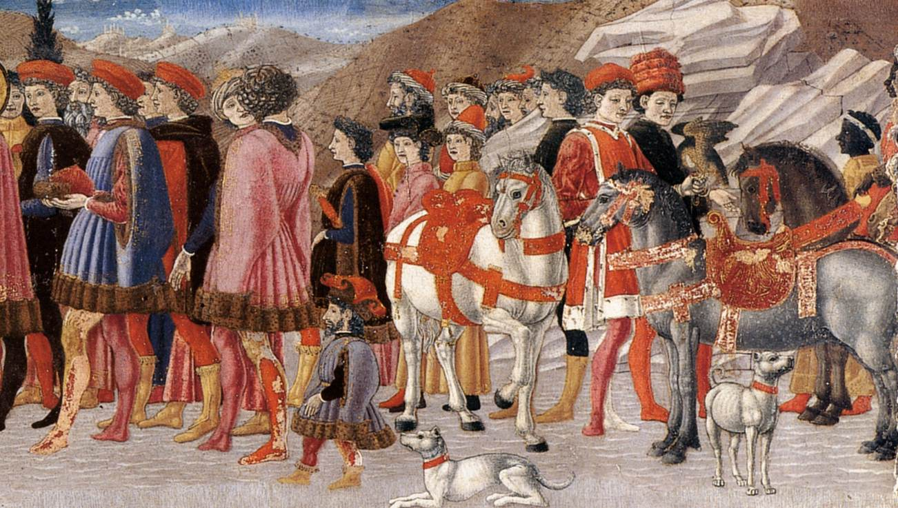 detail